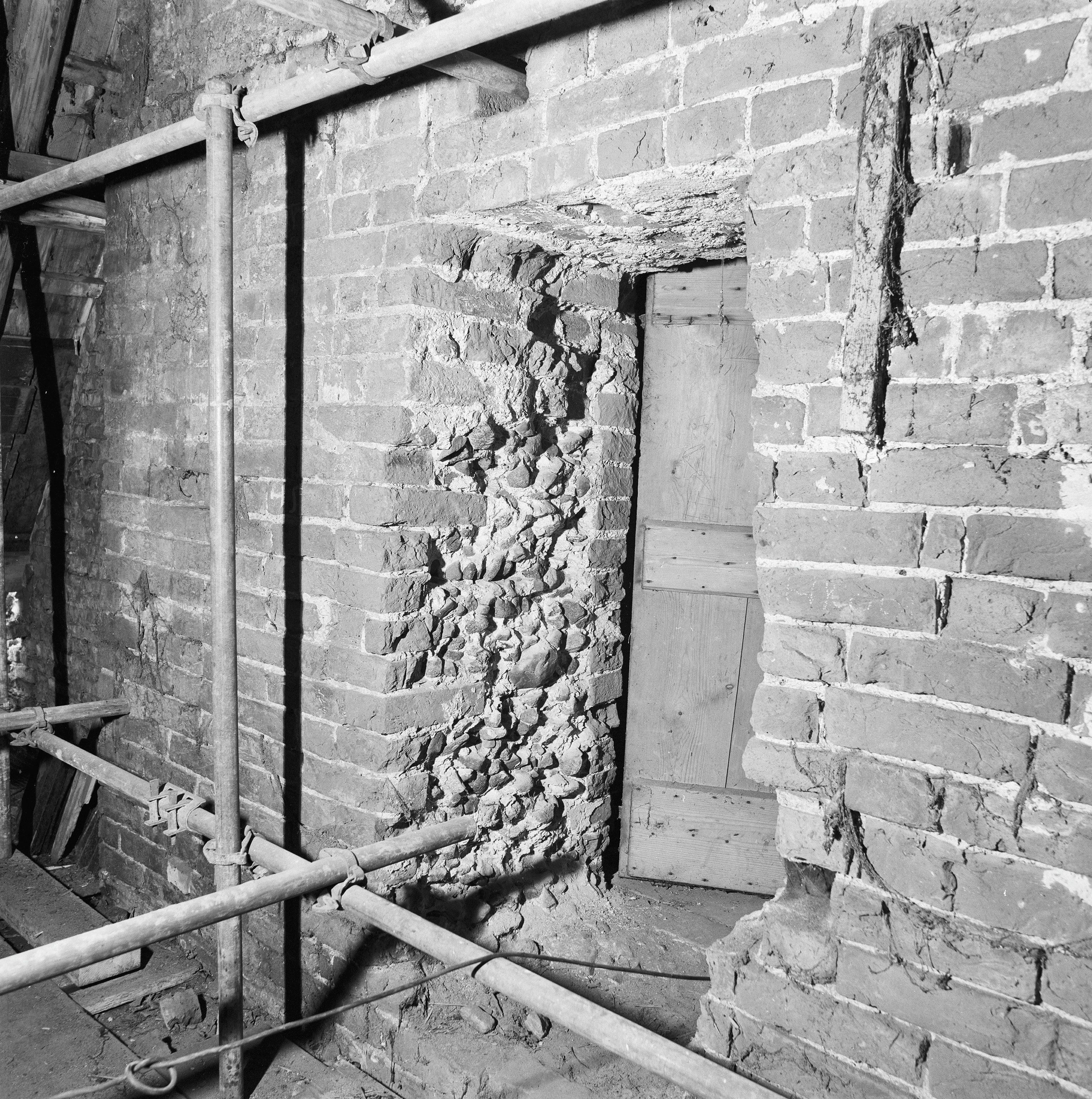 Nederlands Hervormde Kerk: ingehakte doorgang toren, kap schip